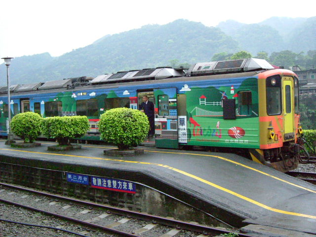 臺灣鐵路管理局DR1000型柴油車臺北縣政府彩繪列車行駛平溪線。